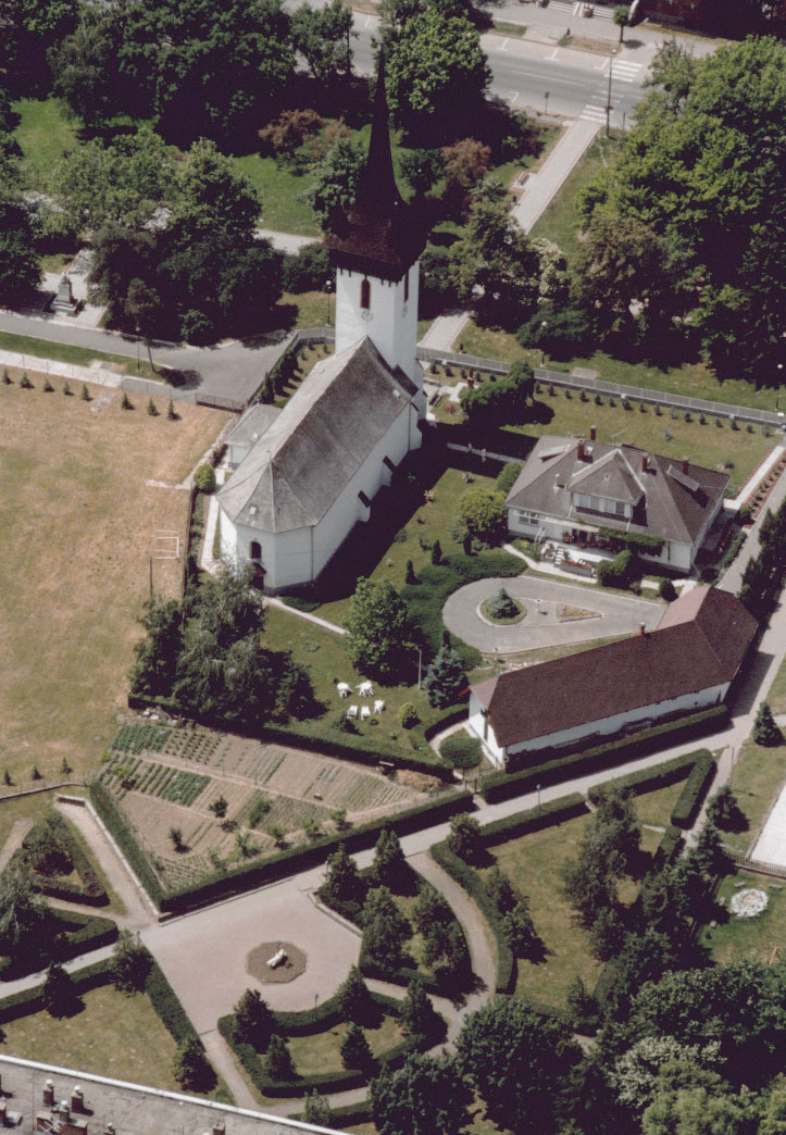 Fehérgyarmat - Hungary - Europe